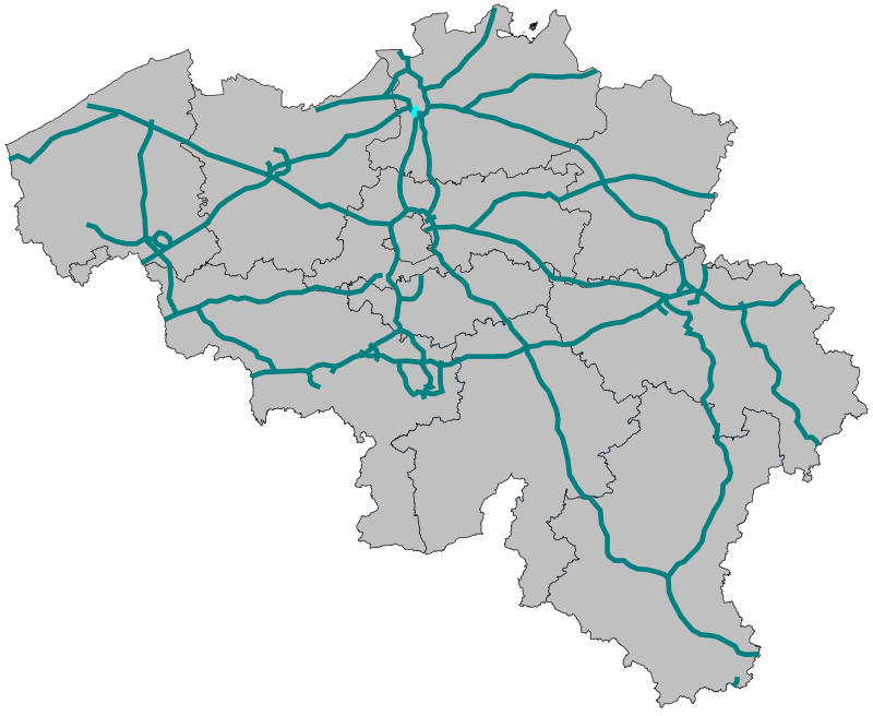 Traject A112 (België)